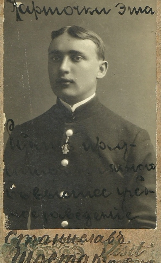 Stanisław Szostak - matura